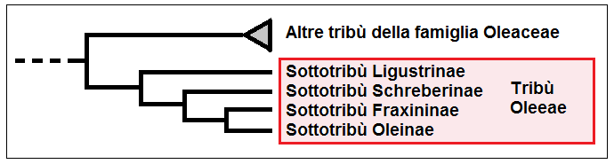 Oleeae - Cladogramma della tribù